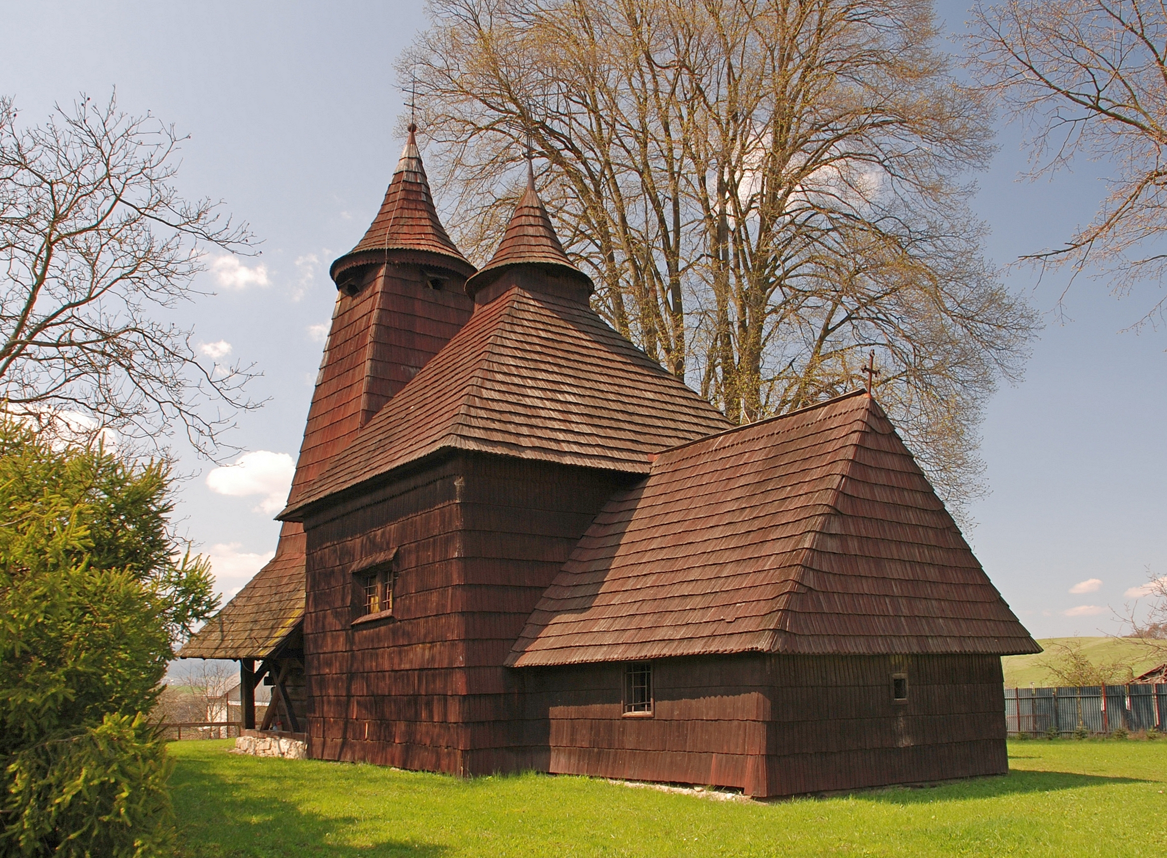 wieś Tročany